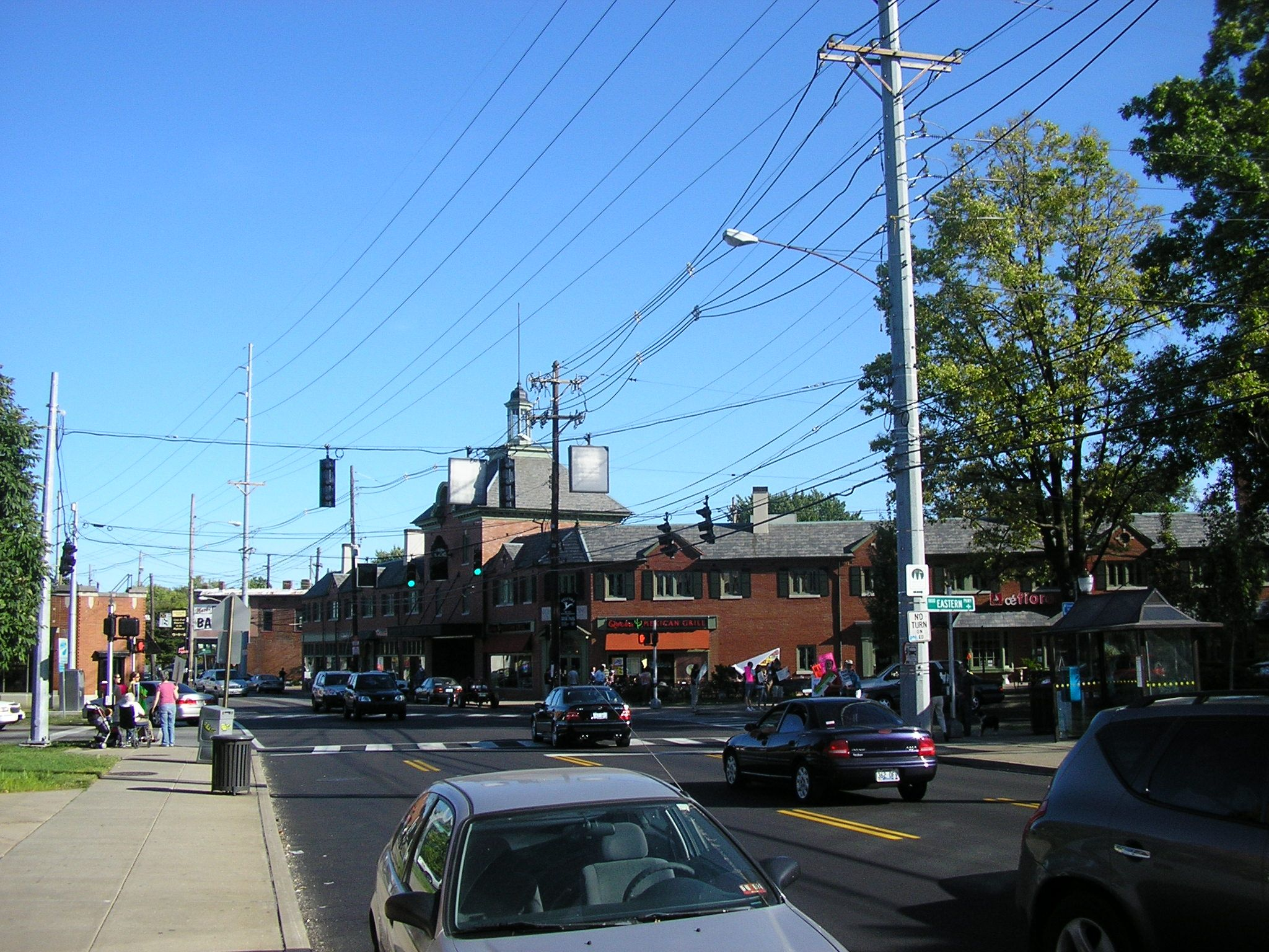 Schuster Building in 2007